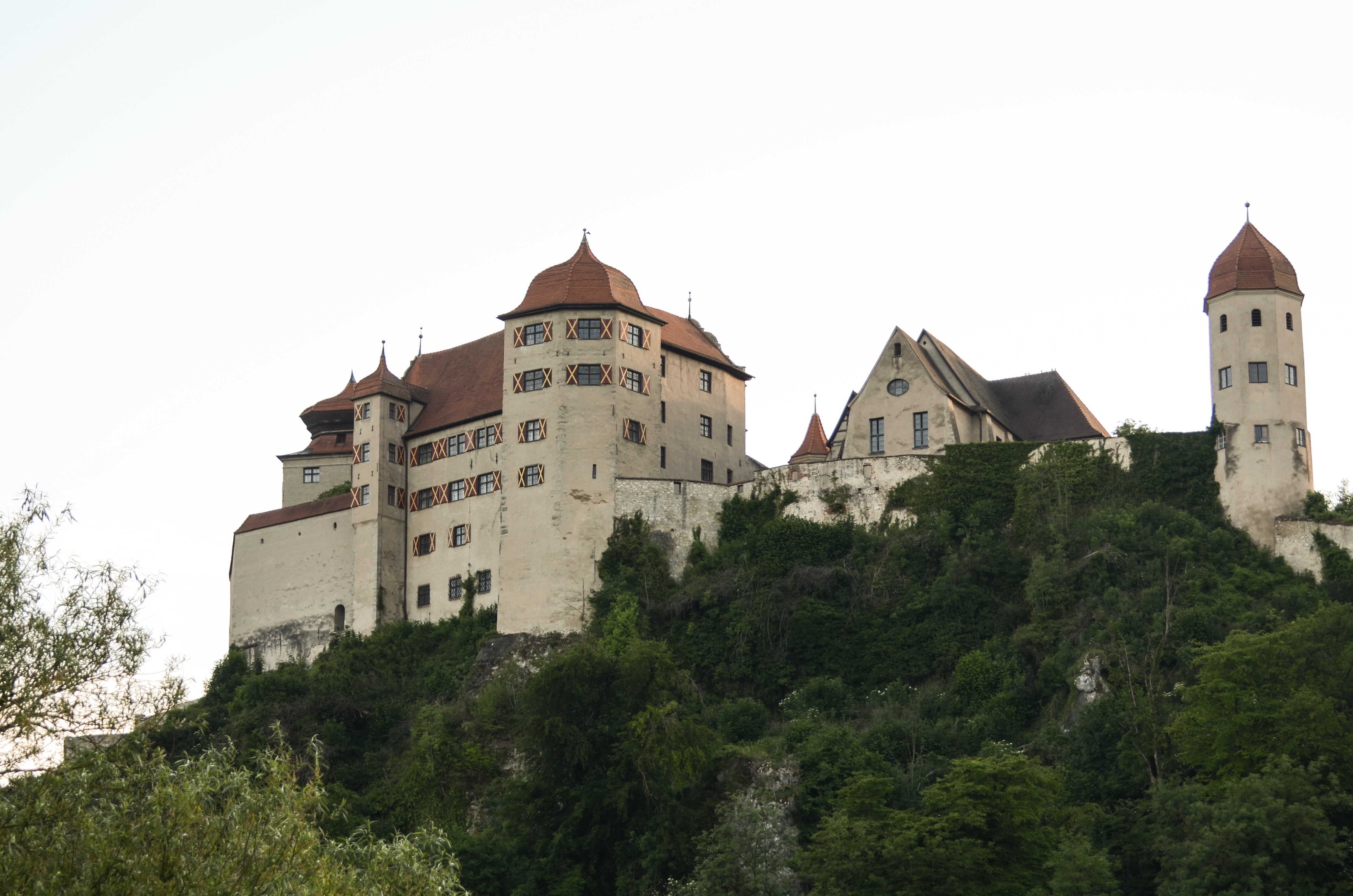 Burg Harburg